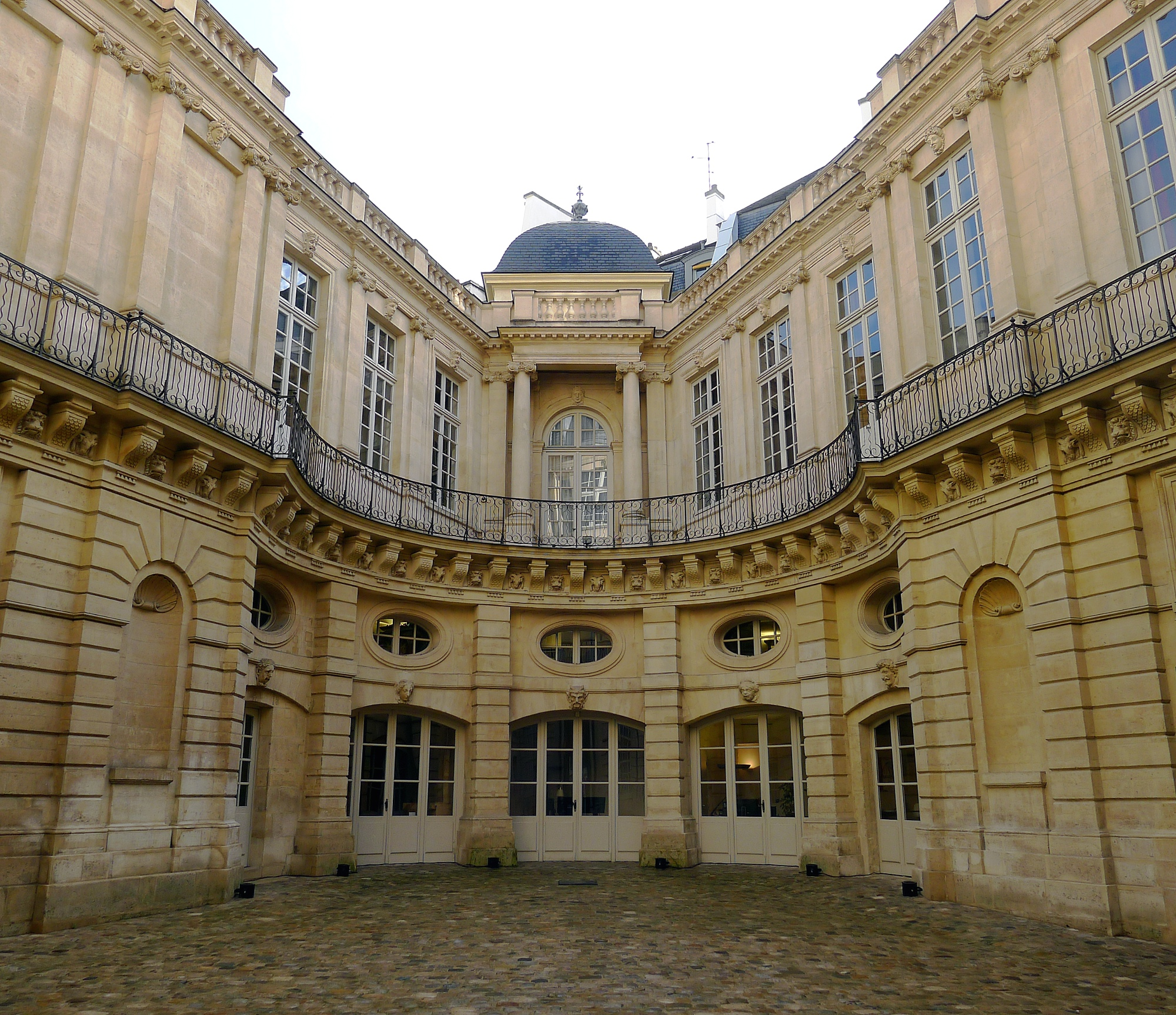 Hôtel de Beauvais (façade intérieure) - Paris IV